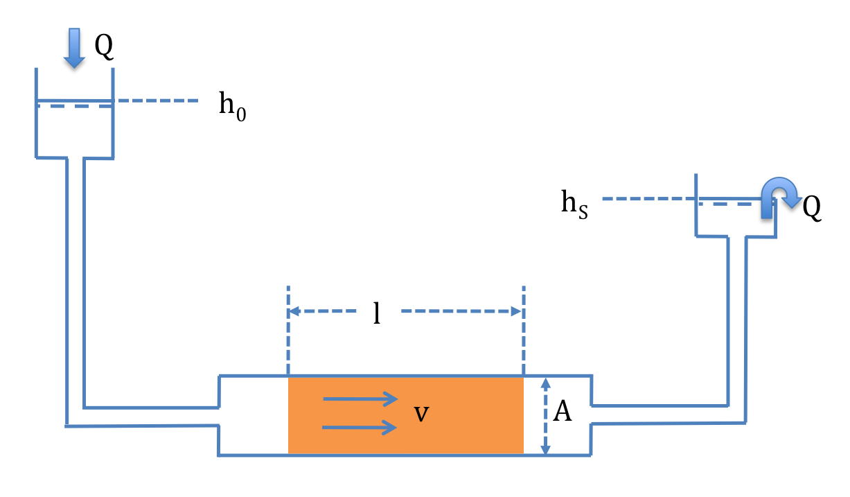 Forsøgsopstilling med endimensionel parallelstrømning